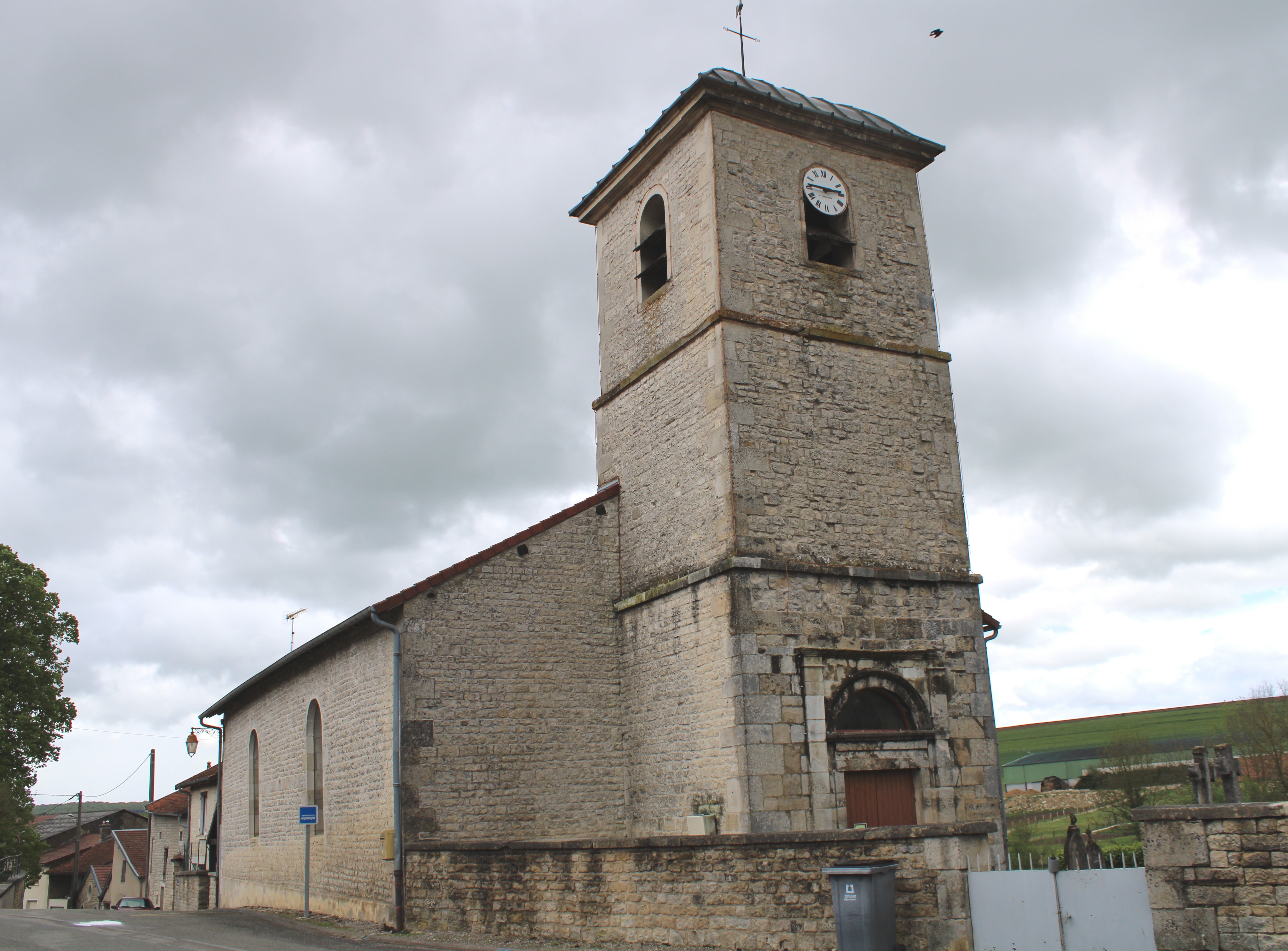 Vue de l'église.